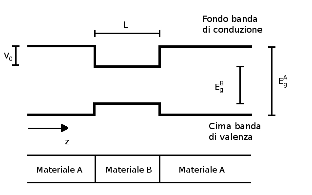 Schema delle bande di energia per la struttura quantistica pozzo quantico.